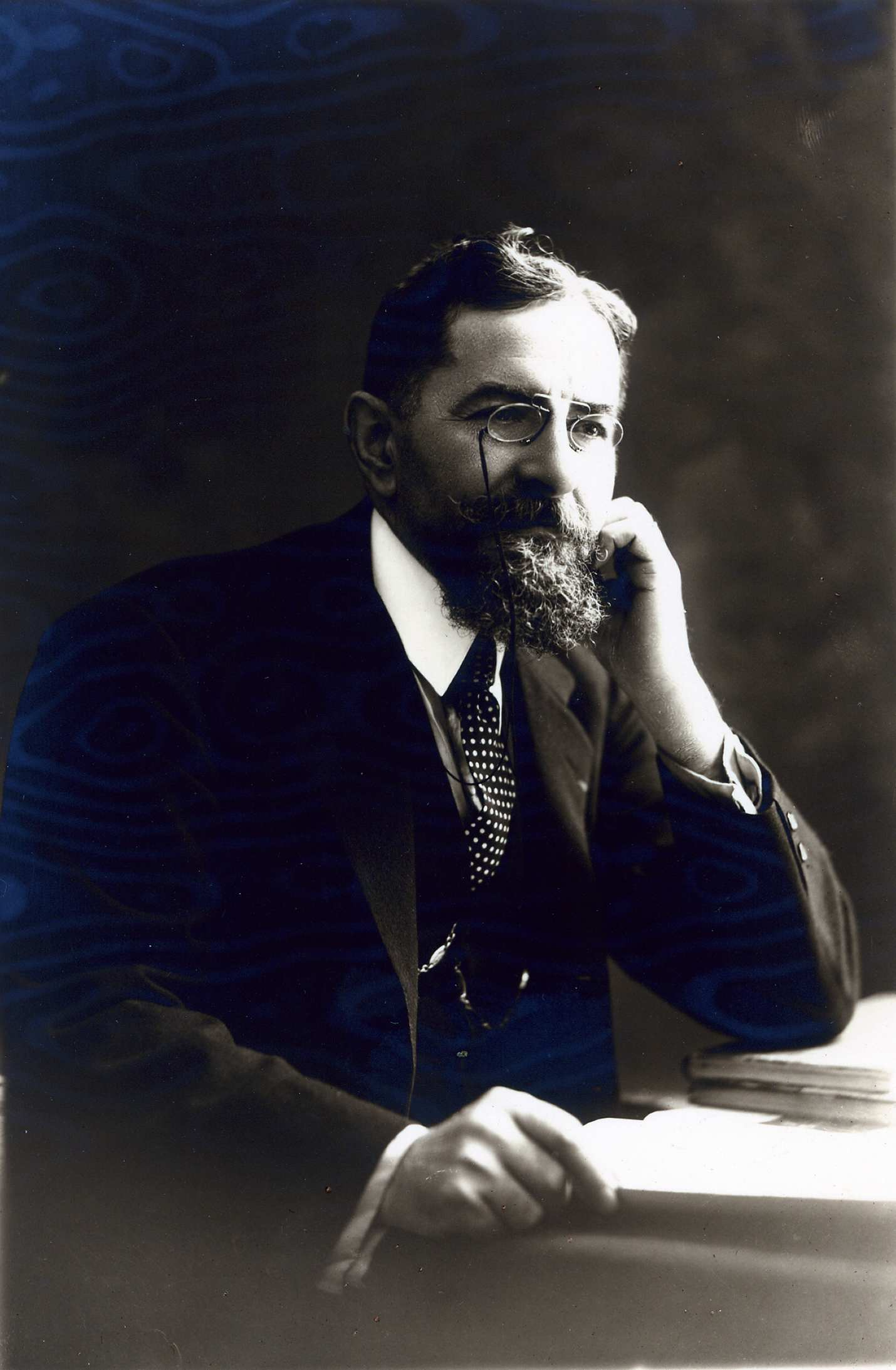 Dominique Bimes, professeur à l’École vétérinaire de Toulouse, cofondateur avec Emmanuel Leclainche de l'Institut de Sérothérapie de Toulouse